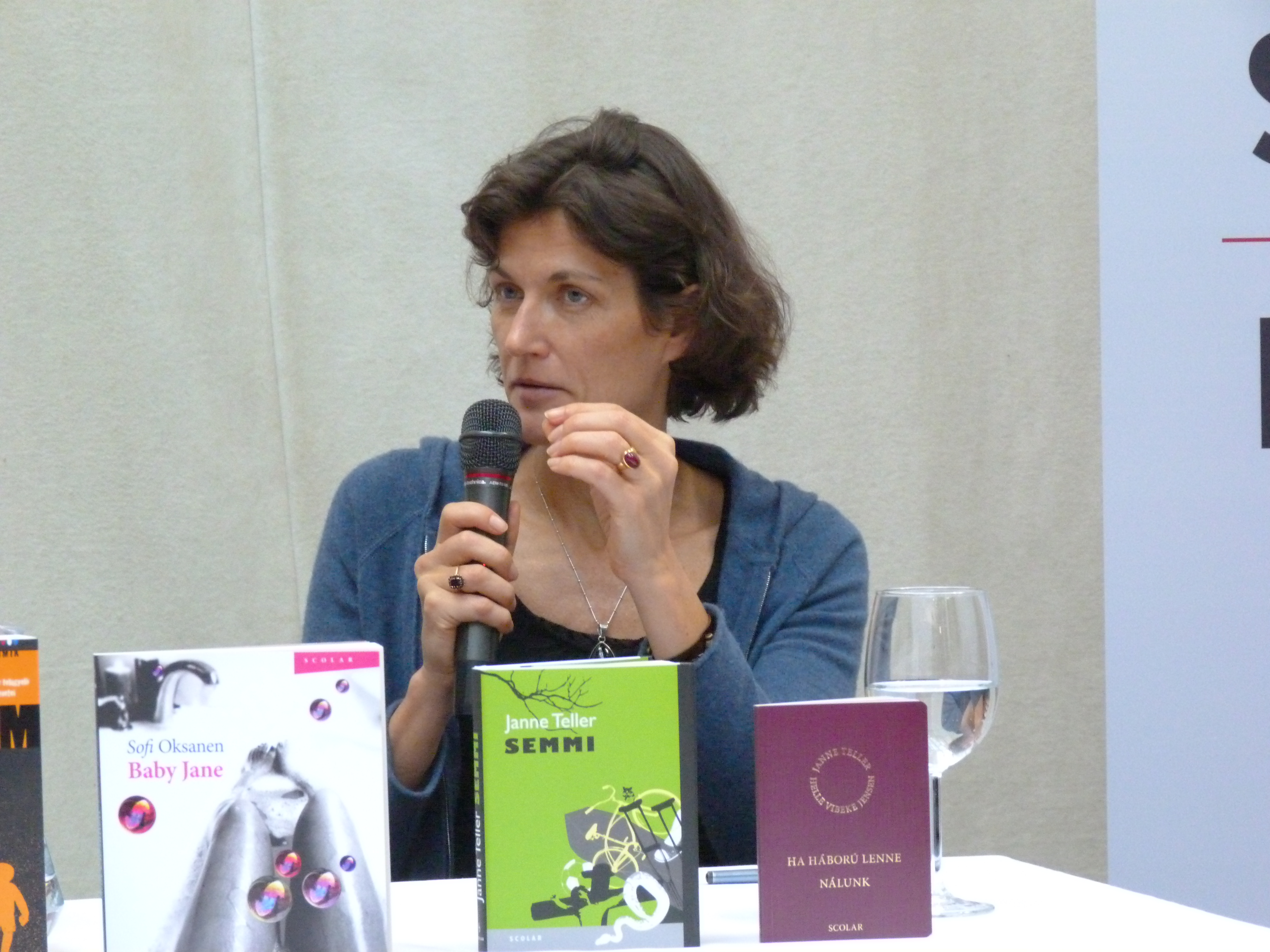 A felvételek 2012. április hó 21 –én, szombaton készültek Budapesten, a XIX. Budapesti Nemzetközi Könyvfesztiválon (2012. április 19 –22). A fesztivál díszvendége Claudio Magris volt. A fesztivál szombati napján az északi országok írói közül a Scolar Kiadó munkatársai - Illés Andrea főszerkesztő, Fejes Szilvia fordító - Janne Teller dán írónővel Semmi című könyvéről beszélgettek (438, 479, 480, 481, 502, 503, 504, 506). Sigurjón Birgir Sigurdsson (Sjón). (530, 531). Délután mutatta be Szegvári Katalin Hol vagytok, ti régi játszótársak című kötetét, melyet Váncsa István ismertetett, majd Krizsó Szilvia beszélgetett a kötet szereplőivel. Lendvai Pál, Krizsó Szilvia, Juszt László, Vitray Tamás, Böjte Csaba, A felvételek megjelentek Creative Commons alatt a Metapolisz DVD sorozatban. Források: Pompor Zoltán: A szilvafáról messzebb látni - Beszélgetés Janne Tellerrel Könyvhét, könyv.hu Budai Katalin: A róka az róka az róka Sjón: A macskaróka Magvető Szegvári Katalin: Hol vagytok, ti régi játszótársak ? Címkék: Janne Teller 2012 XIX Budapesti Nemzetközi Könyvfesztivál Scolar Kiadó Sigurjón Birgir Sigurdsson napvilagkiado.eu Szegvári Katalin Vitray Tamás Böjte Csaba